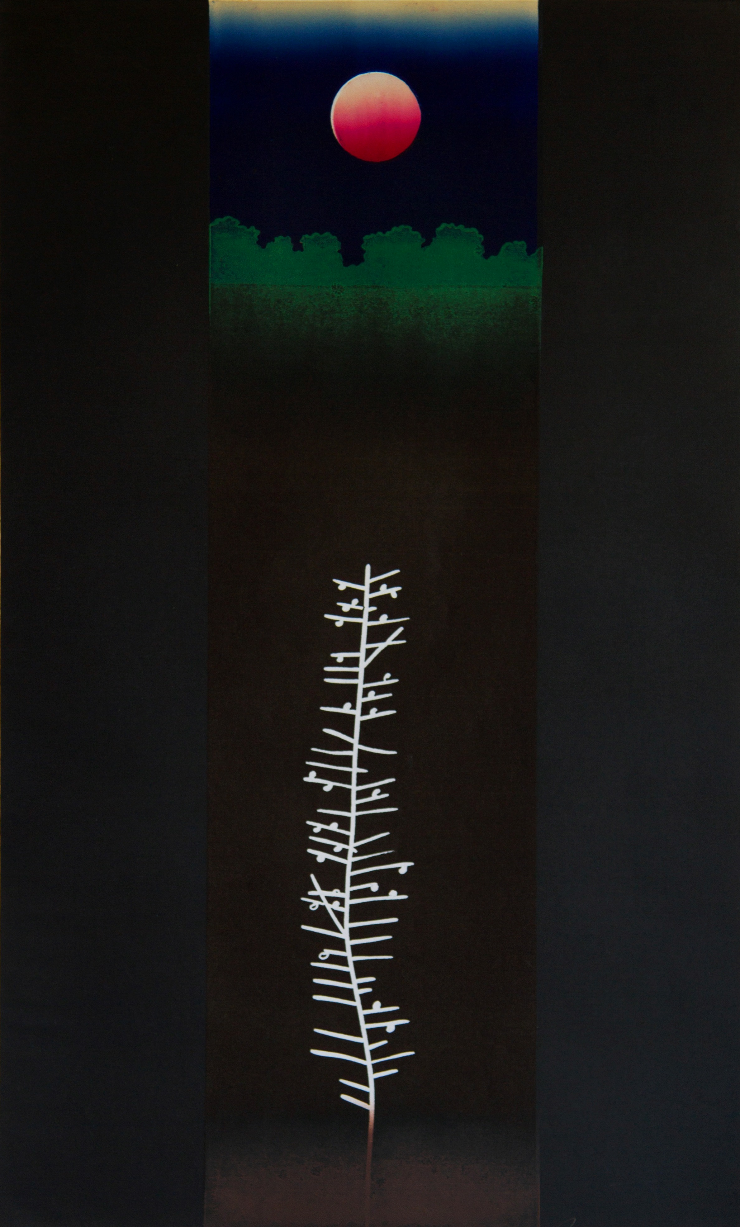 Opowieść o drzewie XI, autor: Zygmunt Czyż, linoryt